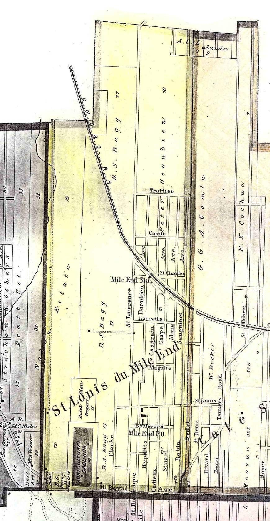 Territoire de Saint-Louis du Mile-End. Détail de la carte " Villages of Cote St. Louis, St. Louis du Mile End, Outremont and Cote des Neiges ", publiée dans l'Atlas of the City and Island of Montreal de Henry W. Hopkins, Montréal, Provincial Surveying and Publishing Co., 1879, p. 90-91.